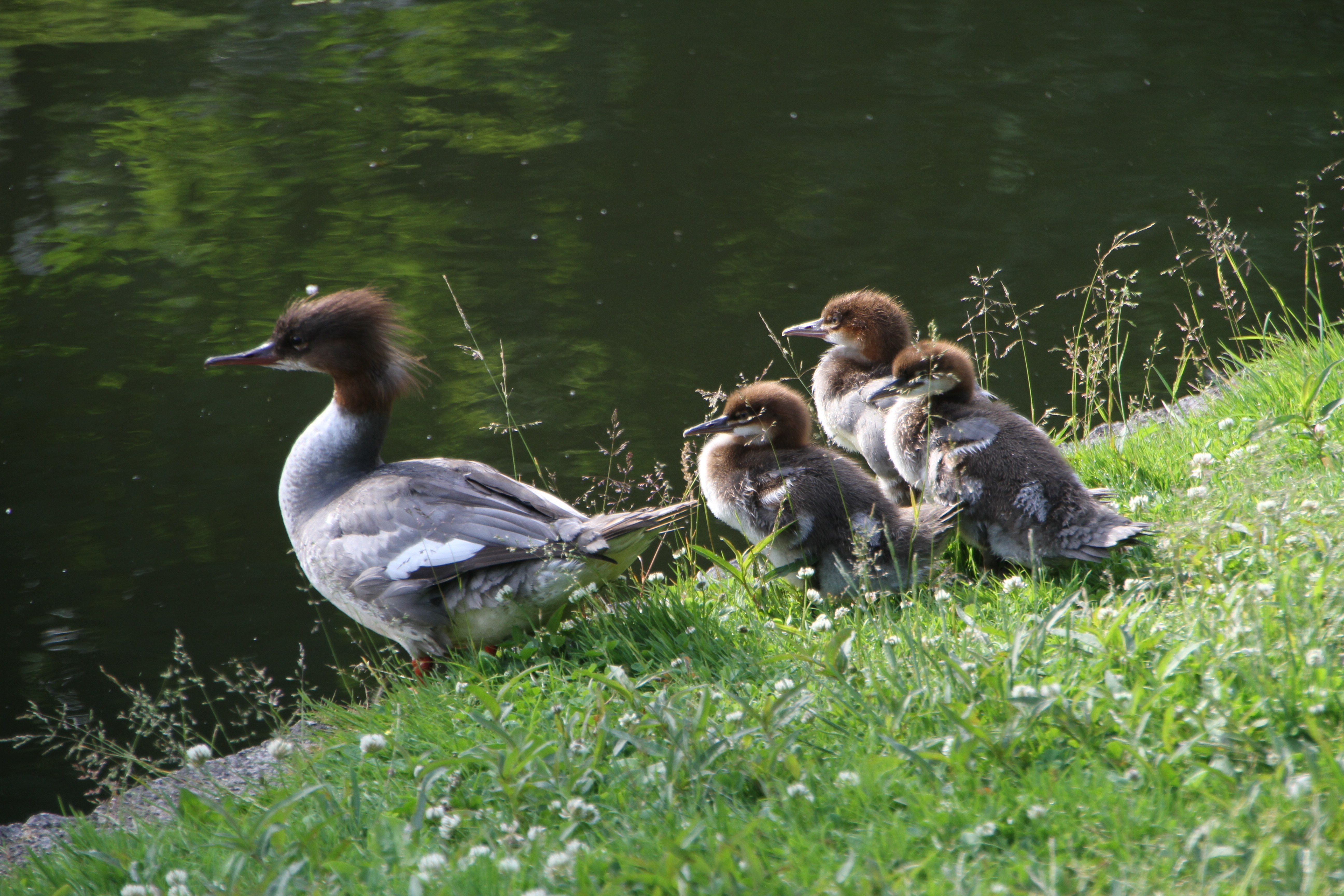 Tallinn, Snell-Teich